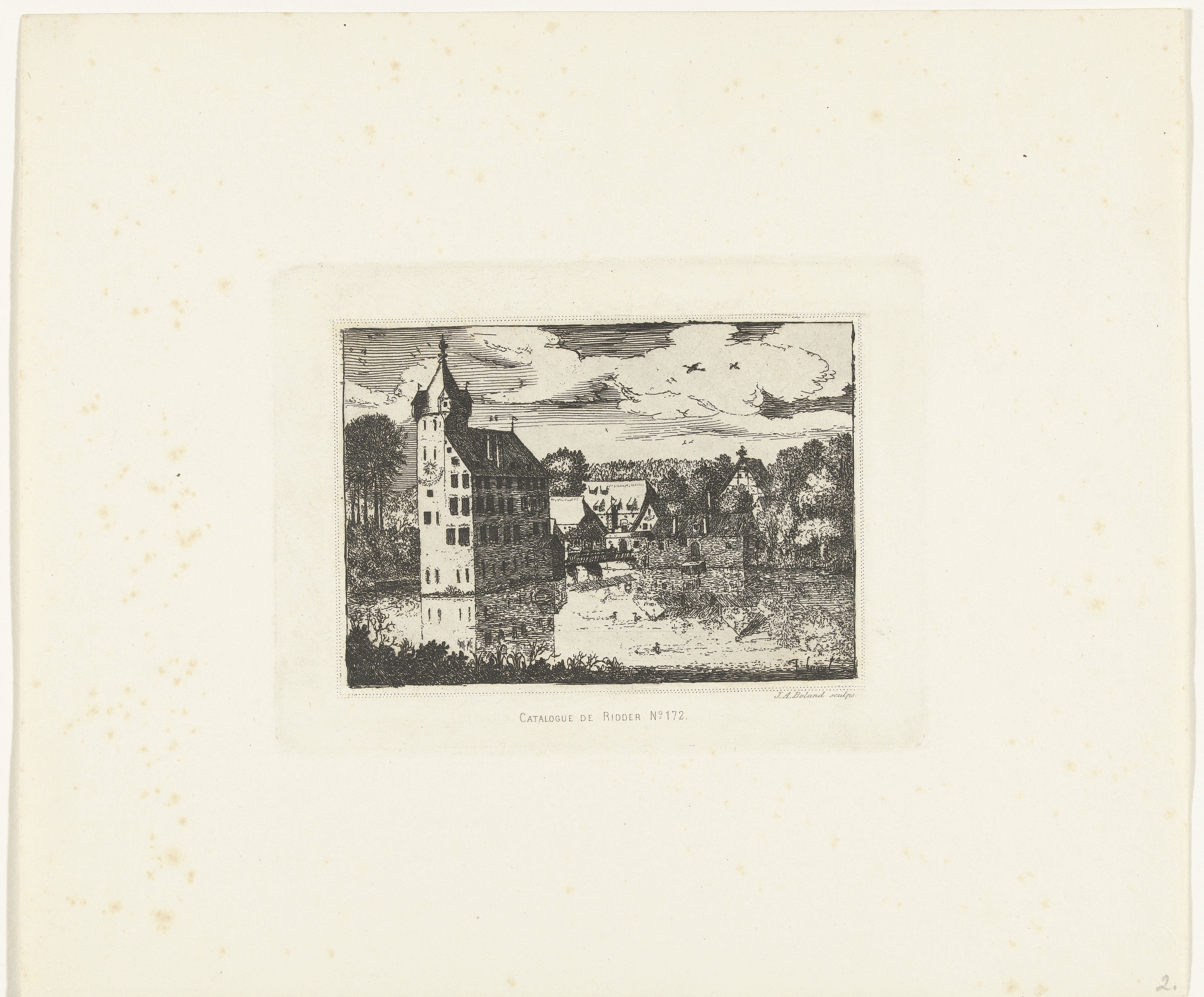 IdentificatieTitel(s): Unterburg te Nürnberg of kasteel Dinterburg nabij NürnbergObjecttype: prent Objectnummer: RP-P-1911-17Opschriften / Merken: verzamelaarsmerk, verso, gestempeld: Lugt 2228VervaardigingVervaardiger: prentmaker: Johannes Arnoldus Boland (vermeld op object)naar ontwerp van: Jan Brueghel (I)Plaats vervaardiging: AmsterdamDatering: 1874Fysieke kenmerken: etsMateriaal: papier Techniek: etsenAfmetingen: plaatrand: h 122 mm × b 158 mmToelichtingIllustratie voor de catalogus van de collectie C.C.J. de Ridder (Utrecht), verschenen in 1874.OnderwerpWat: landscape with tower or castleWaar: UnterburgVerwerving en rechtenCredit line: Schenking van de heer J.A. BolandVerwerving: schenking 1911Copyright: Publiek domein